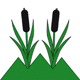 Flago de Eggersriet, Kantono Sankt-Galo